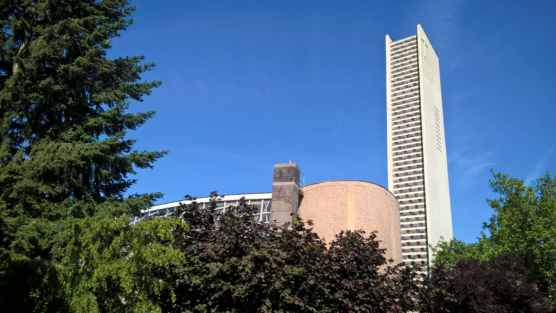 Petruskirche, Gießen, Hessen, Deutschland